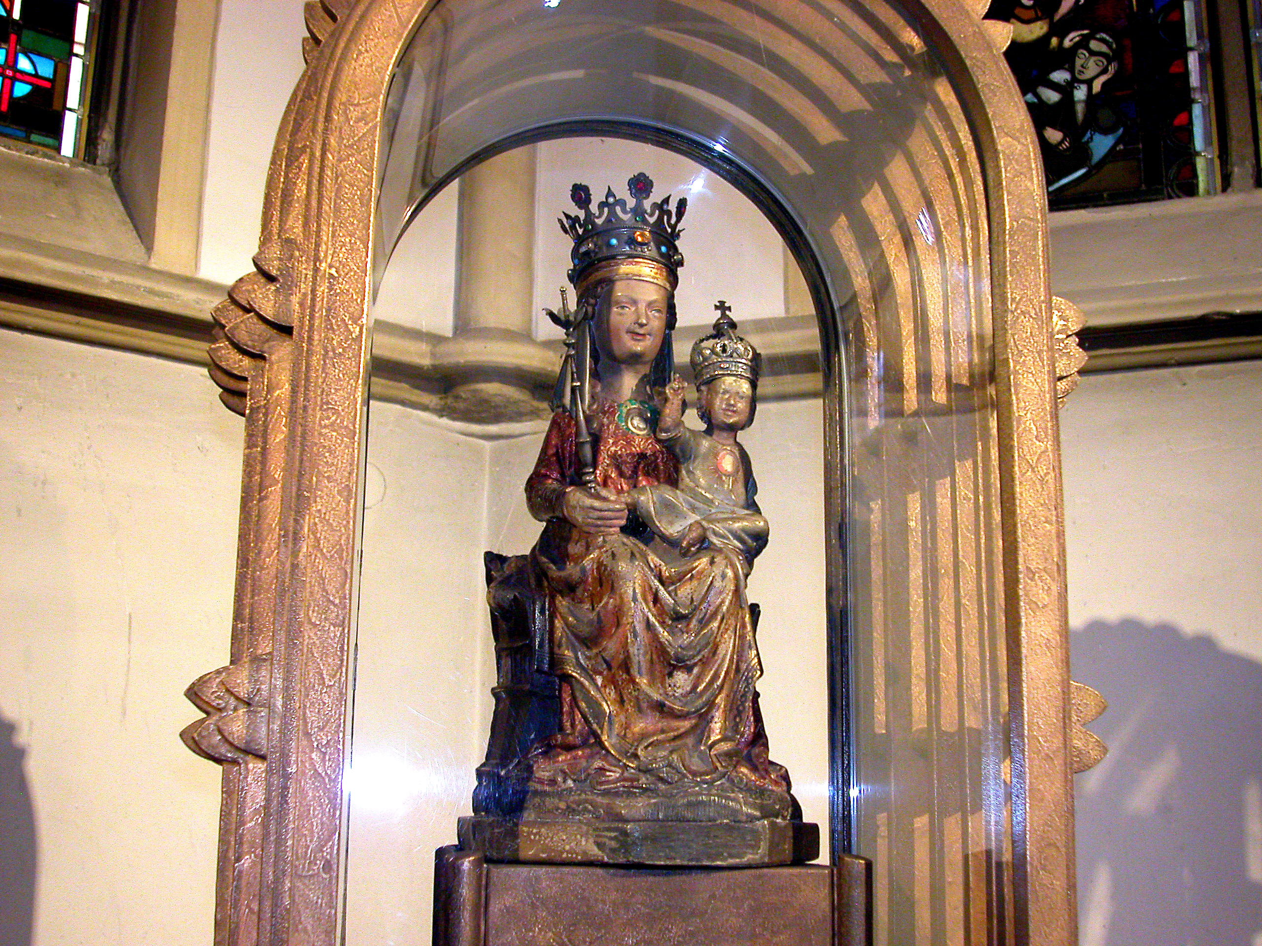 Das Gnadenbild (13. Jh.) aus der Marienkirche in Luenen (de) Чудотворное изображение Пресвятой Девы Марии в церкви св. Марии в Люнене (ru).